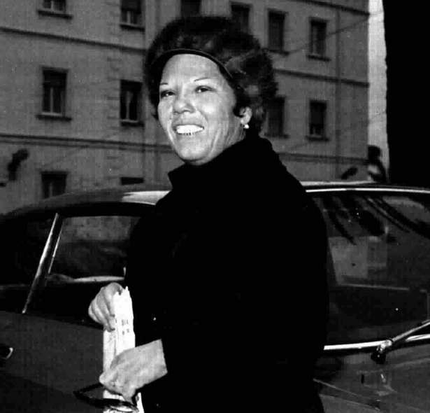 Italian singer Rosa Balistreri